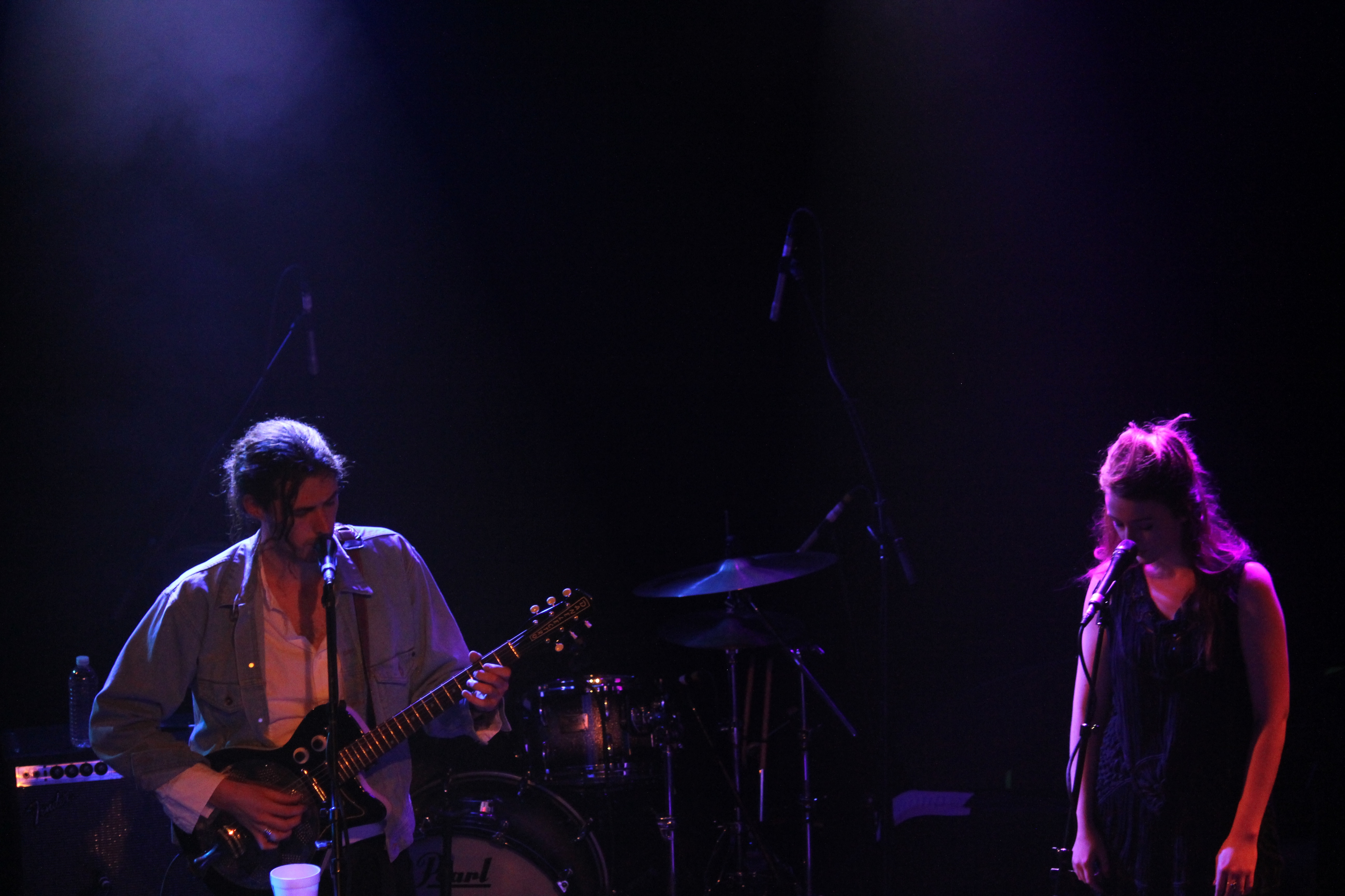 Neon Tommy/Katie Buenneke